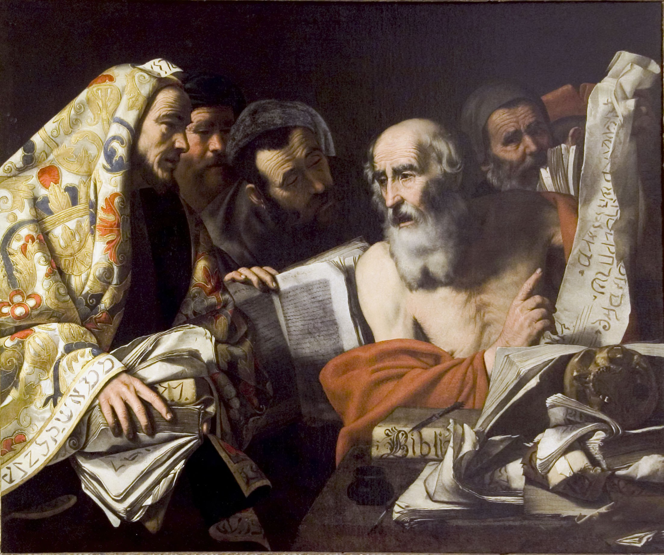 San Girolamo e i Sadducei